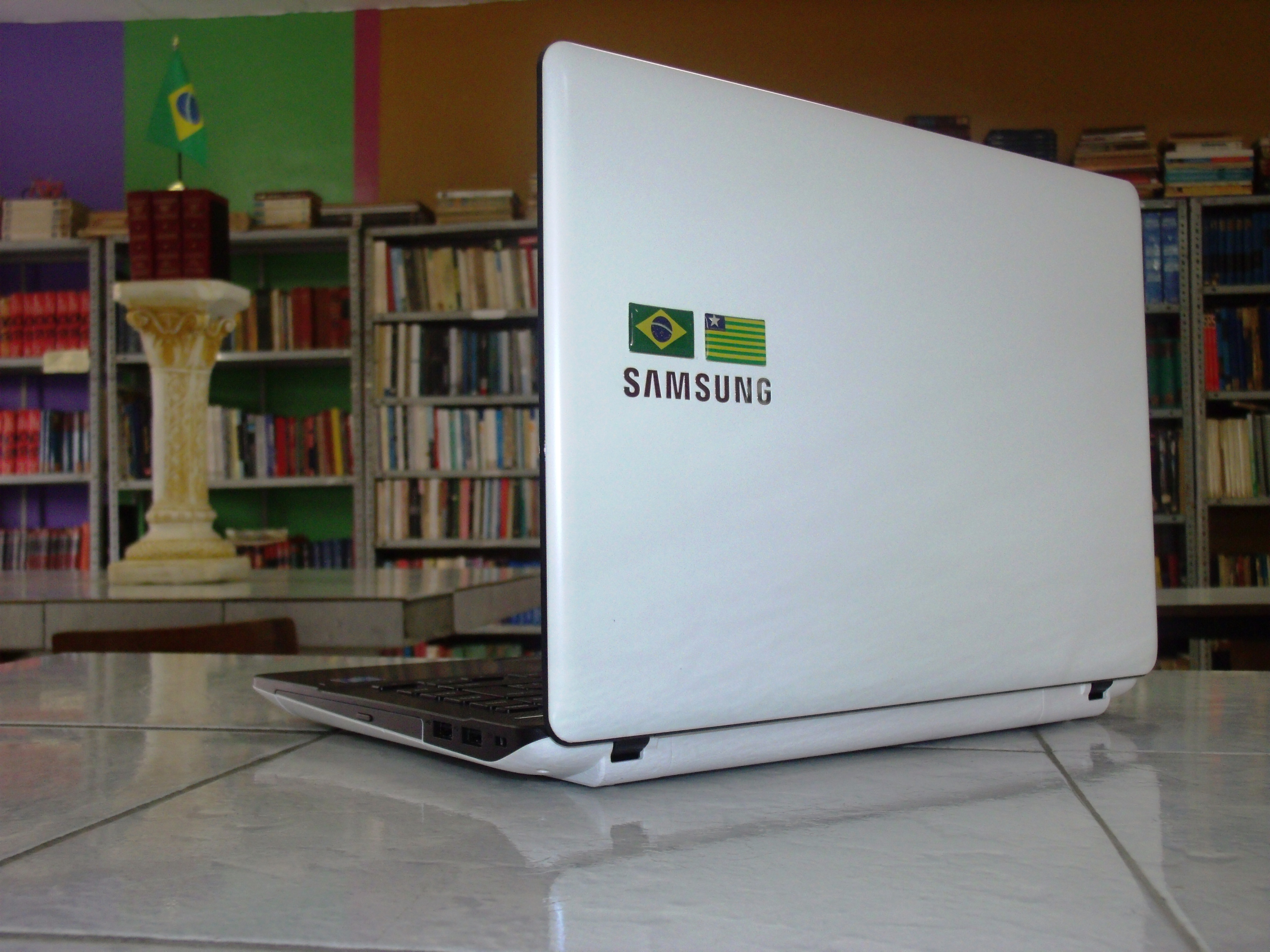 Computador portátil com bandeira do Brasil e do Piauí.